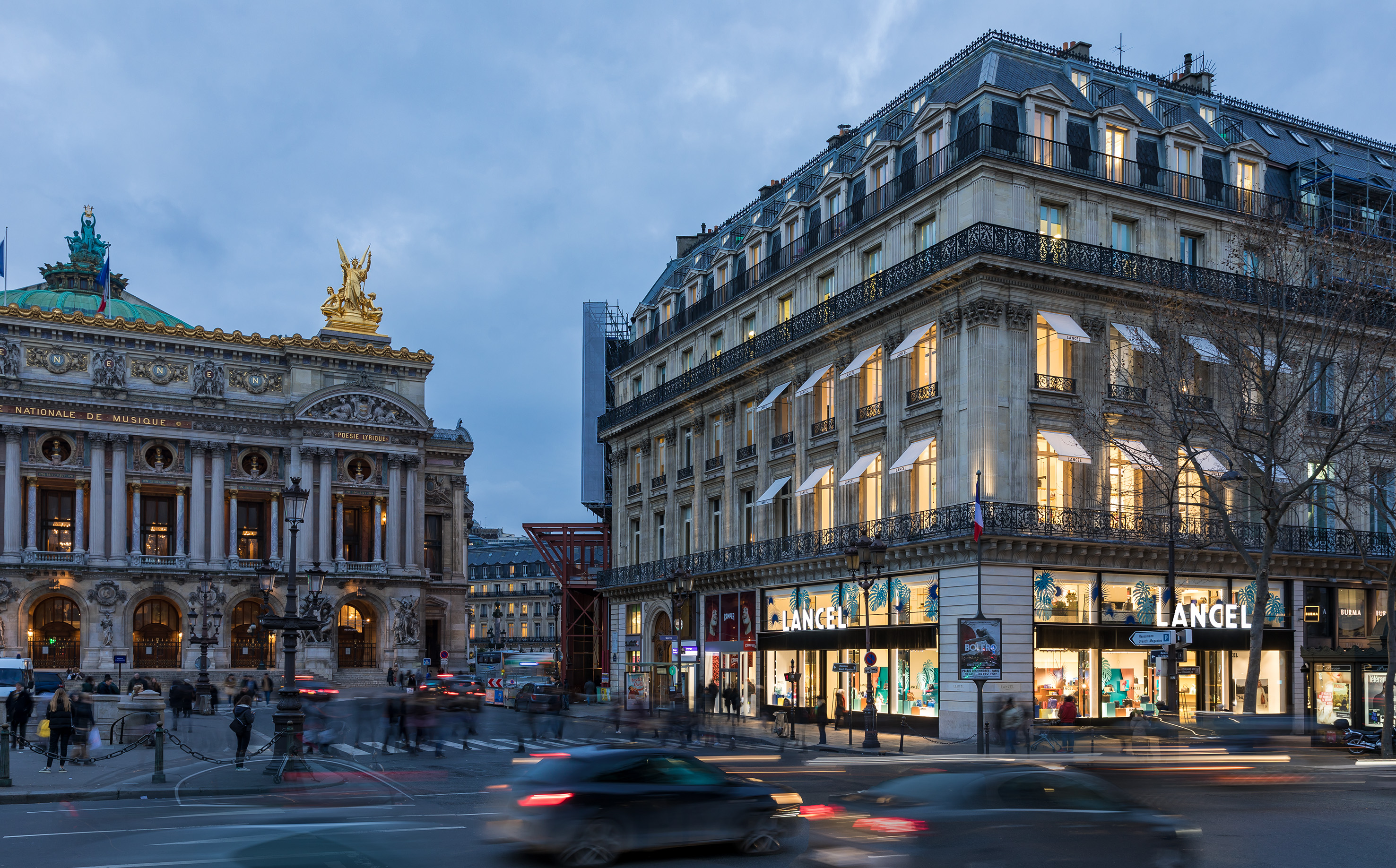 Boutique Lancel située place de l'Opéra à Paris